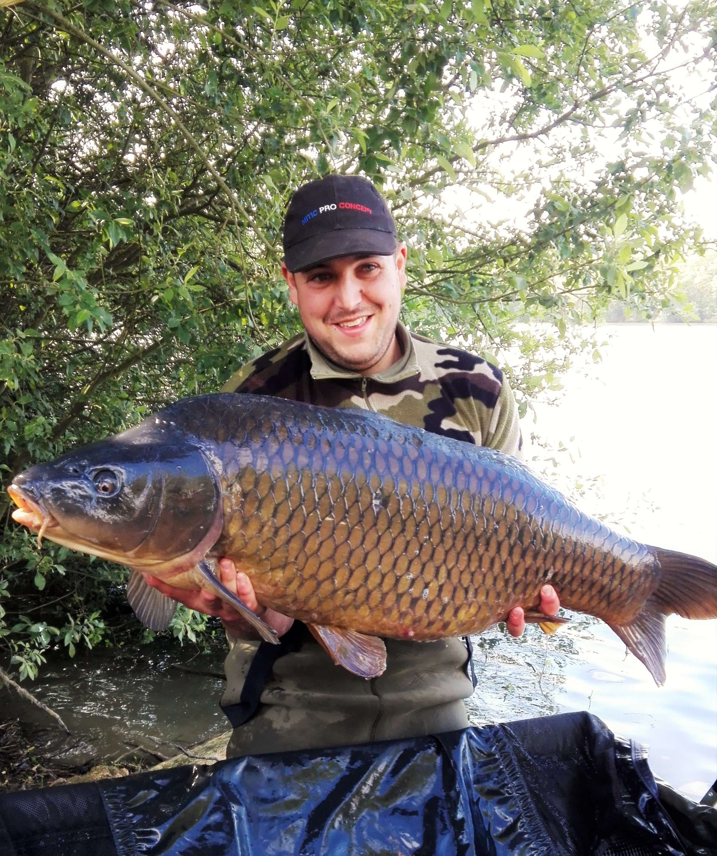 Spécimen représentatif de cet étang de pêche